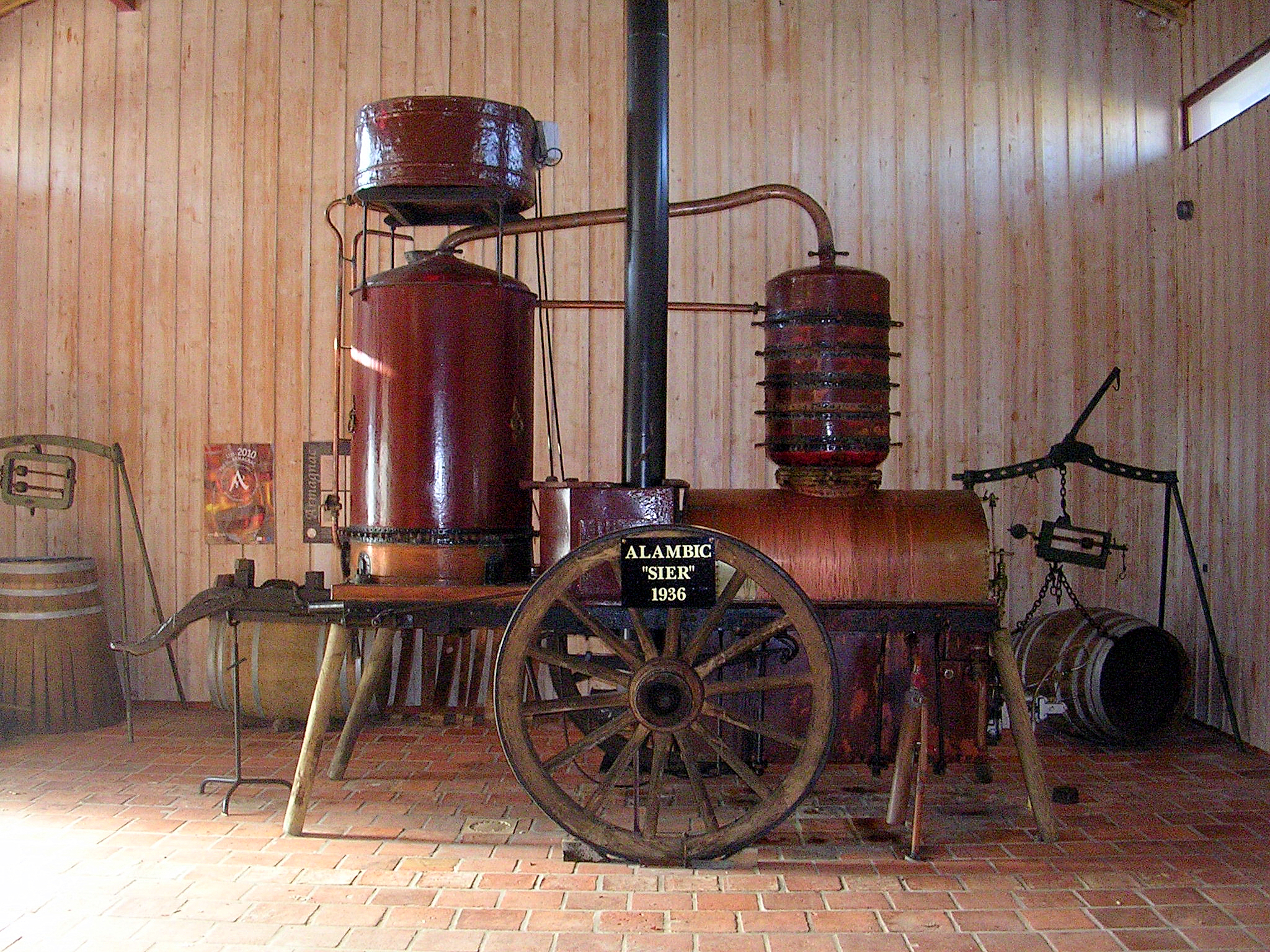 Alambic de 1936 du domaine d'Ognoas, à Arthez-d'Armagnac, dans le département français des Landes